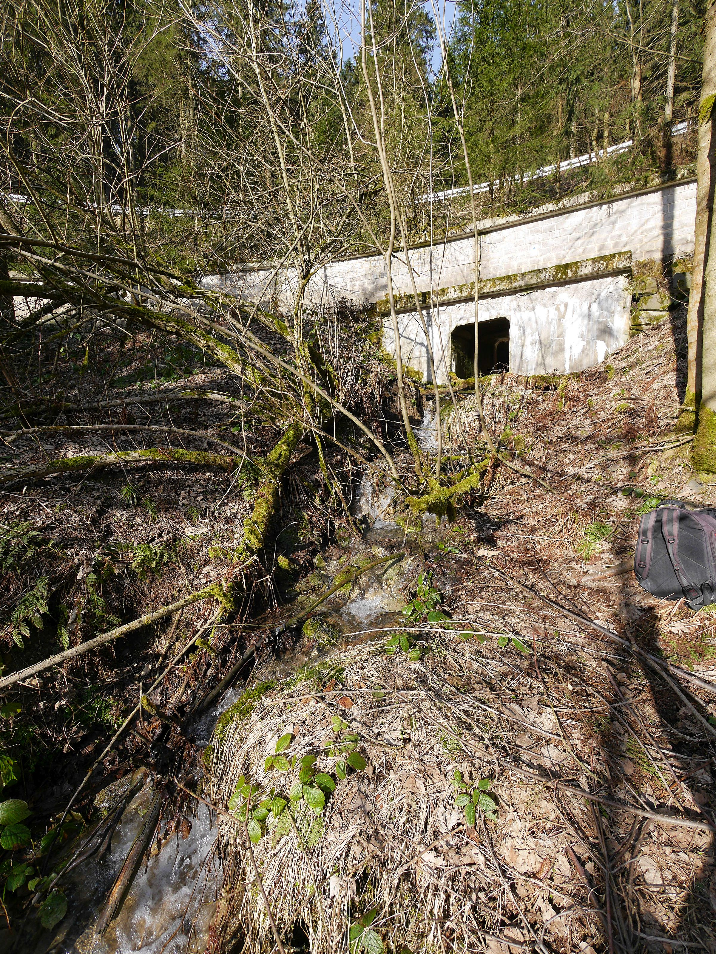 Die ausgemauerte Quelle der Gose. Am oberen Bildrand erkennt man die Leitplanken wird der Bundesstraße 241